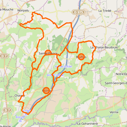 Carte de la commune nouvelle du Parc et ses communes déléguées